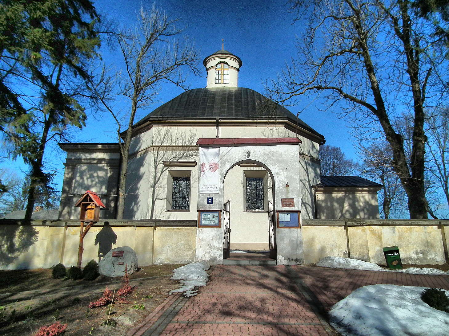 Wrzelowiec, kościół par. p.w. Św. Trójcy, 1777-1867, 1902